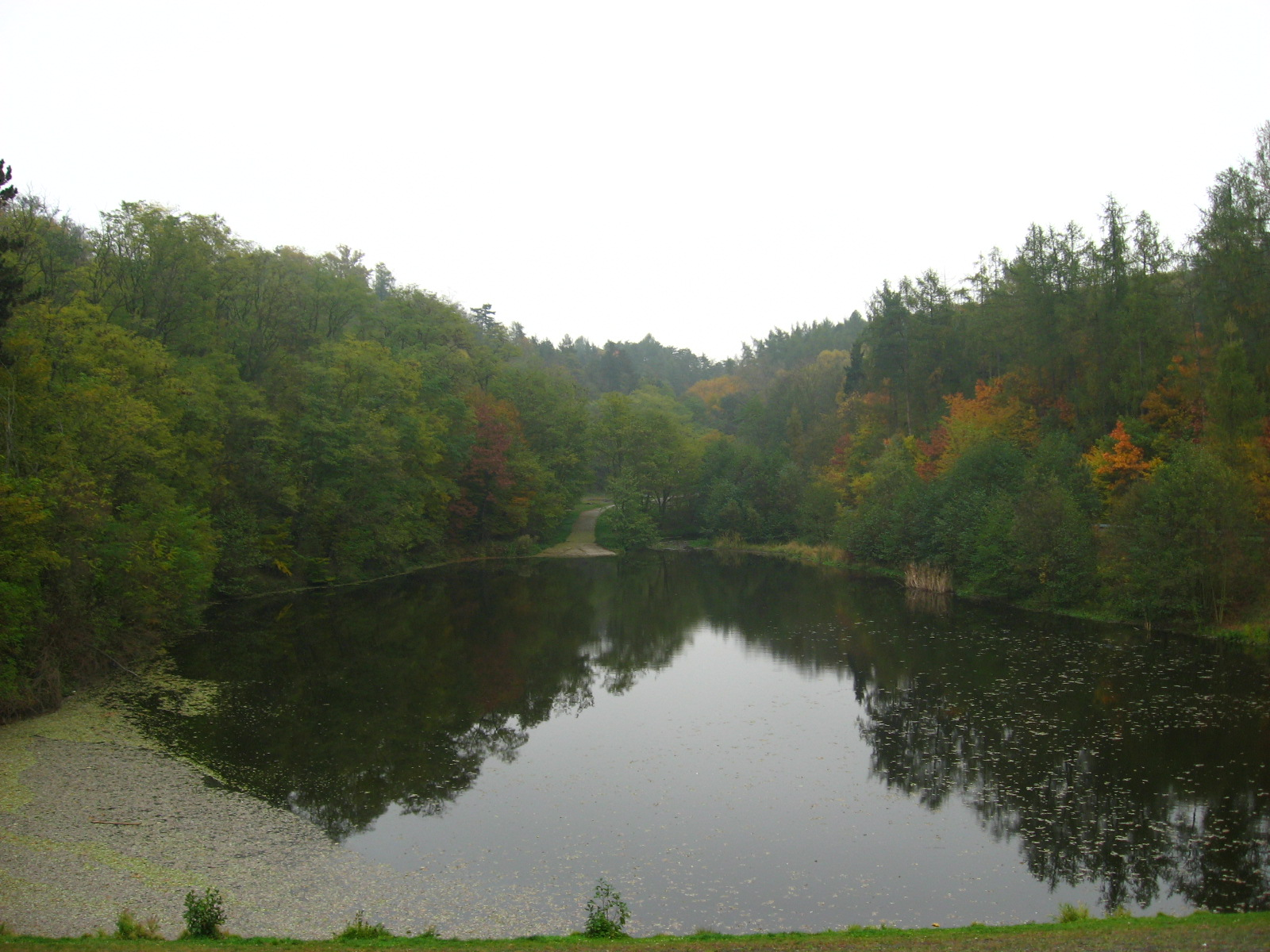 Retenční nádrž v Modřanské rokli, pohled z hráze